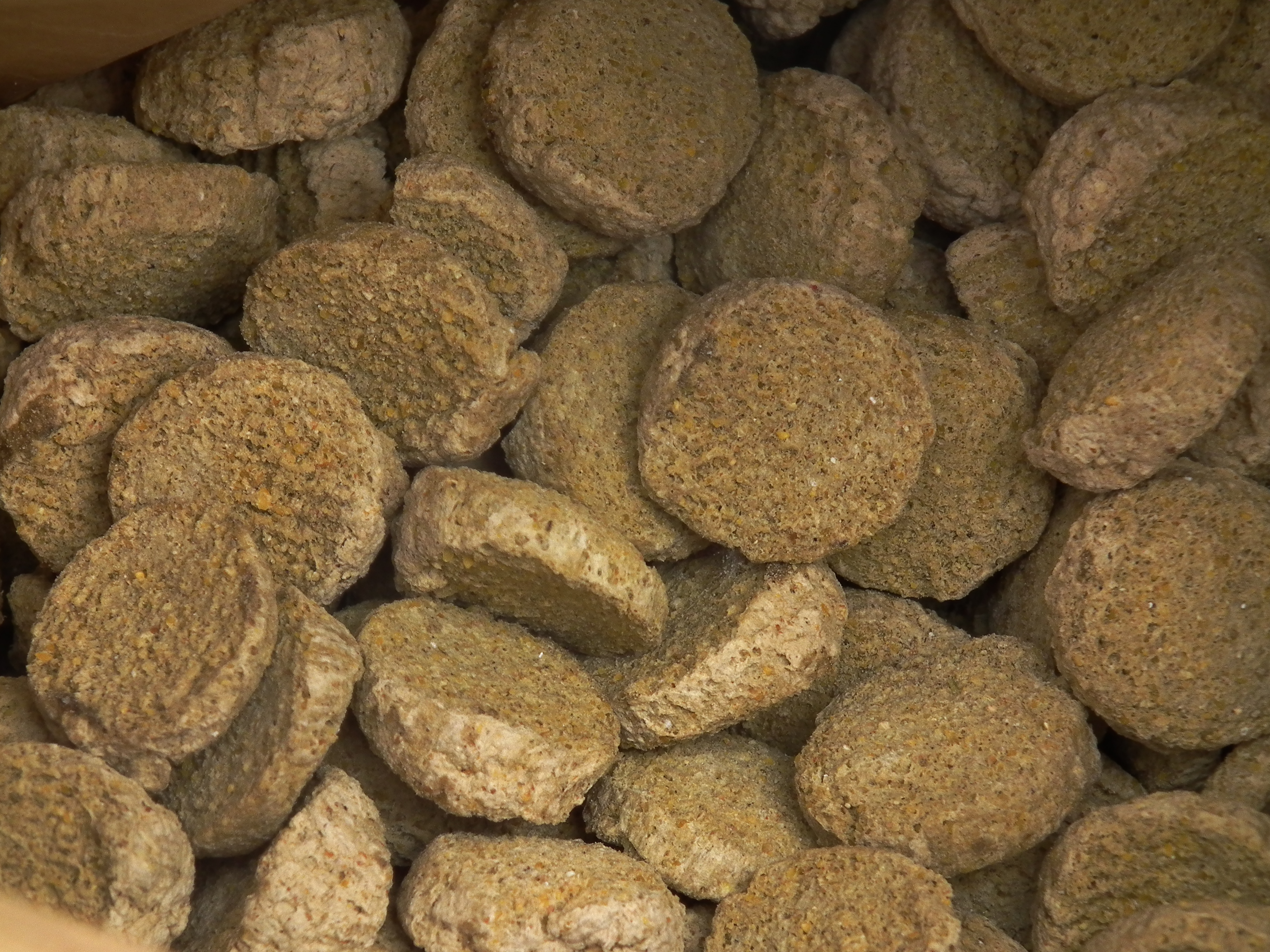 Futterpellets für Pferde